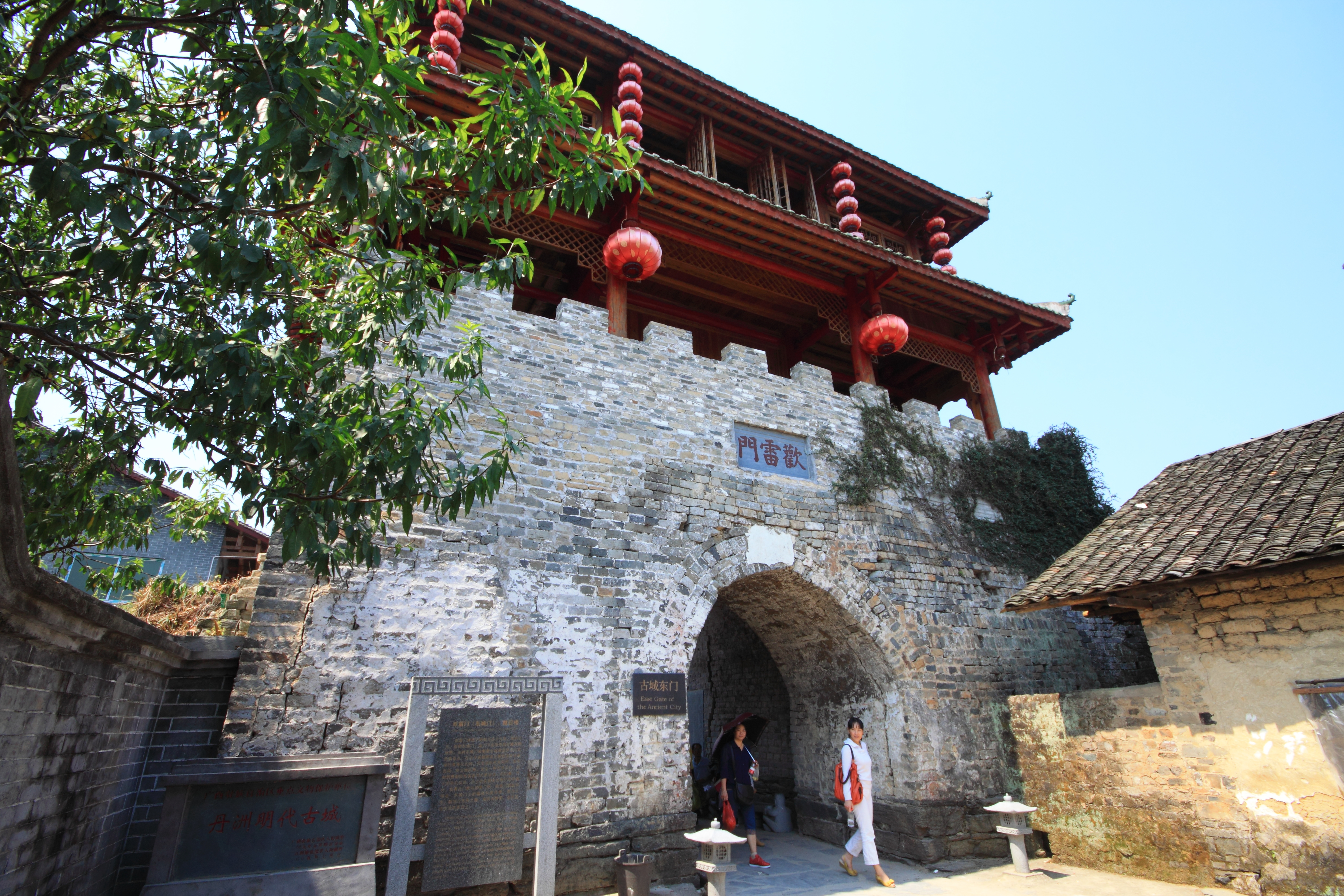 三江侗族自治县丹洲镇 —— 东门（欢雷门）东面